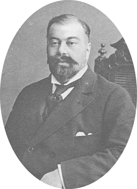 граф Алексей Анатольевич Орлов-Давыдов, член IV Государственной думы от Калужской губернии.